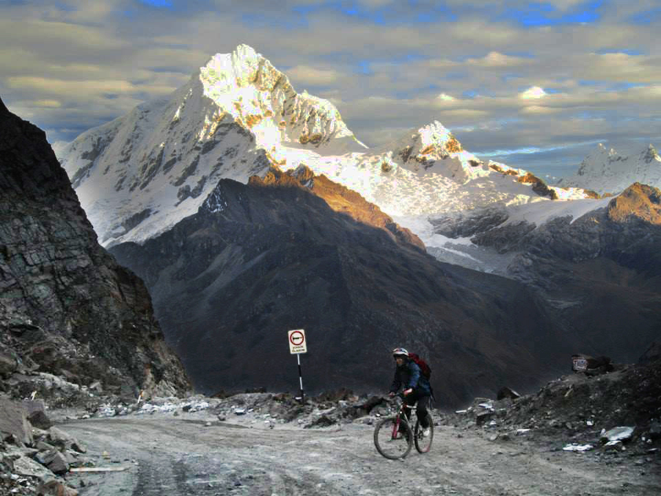 Vista del Chopicalqui desde la carretera Punta Olímpica (4900 msnm)